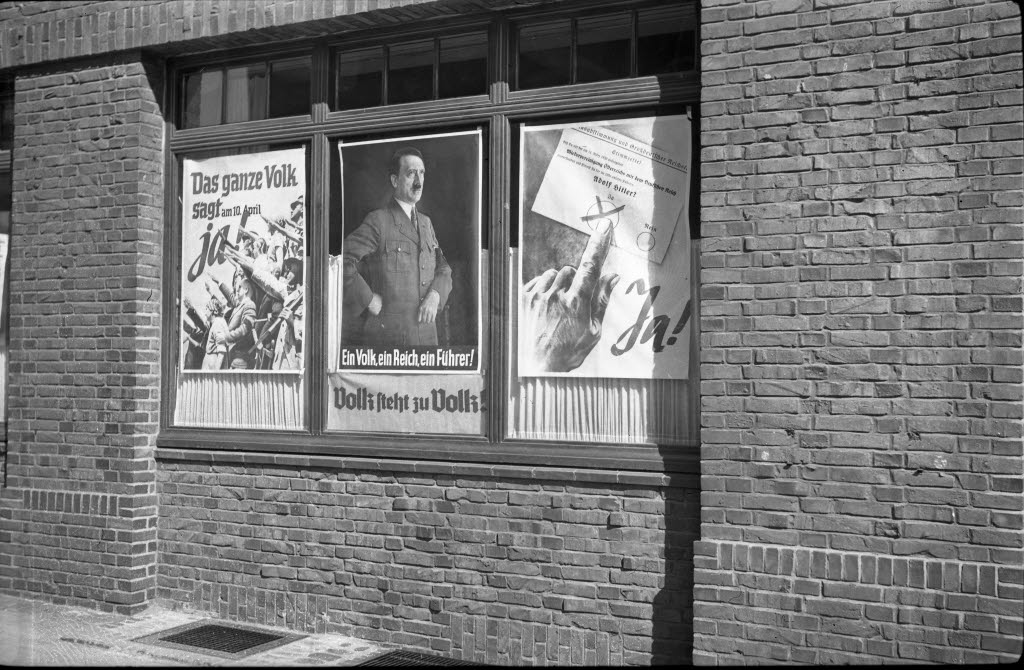 Plakate mit der Aufschrift "Das ganze Volk sagt am 10. April ja!", "Ein Volk, Ein Reich, ein Führer!", "Volk steht zu Volk!" und "Adolf Hitler? Ja!".